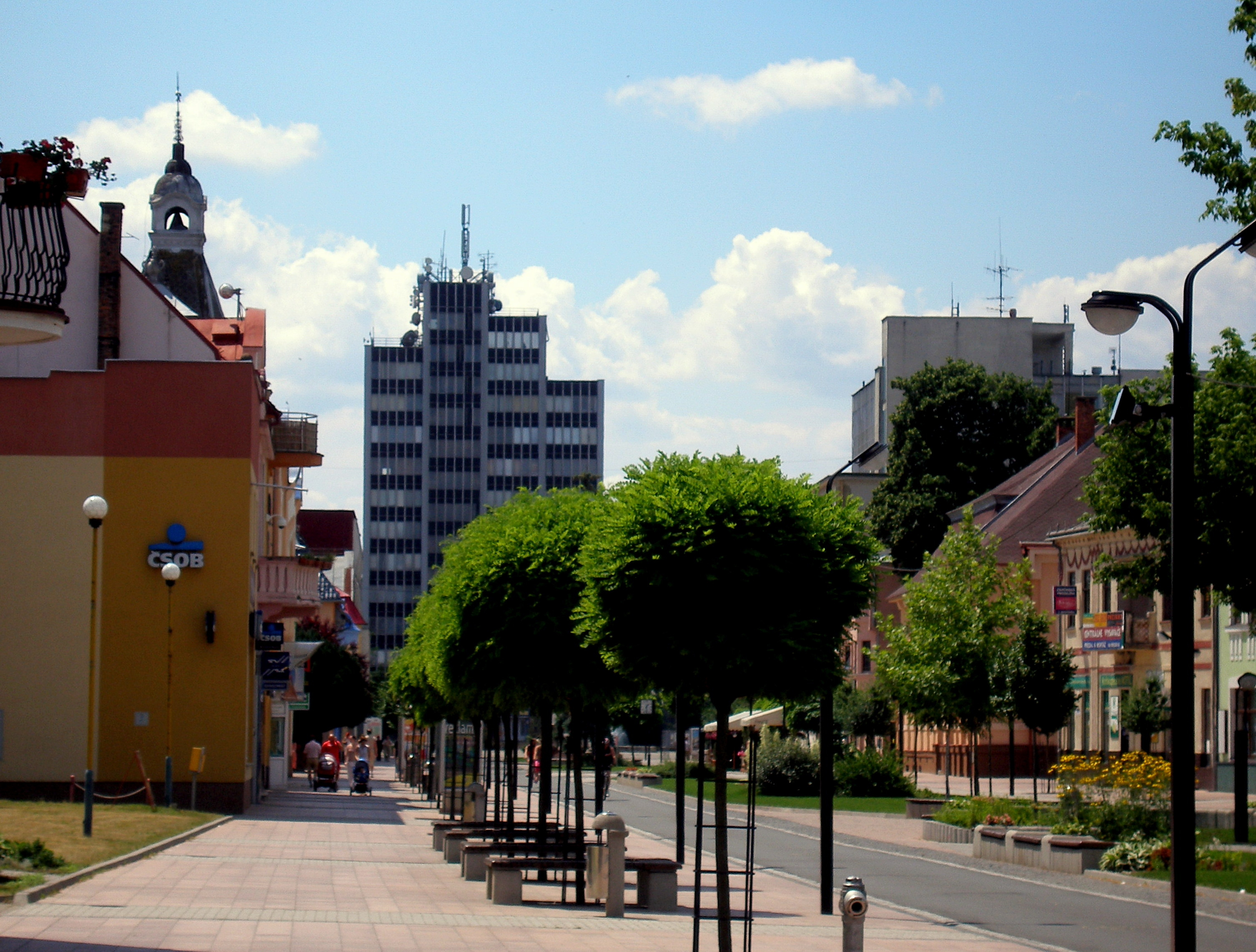 Michalovce, okresné mesto, región Zemplín